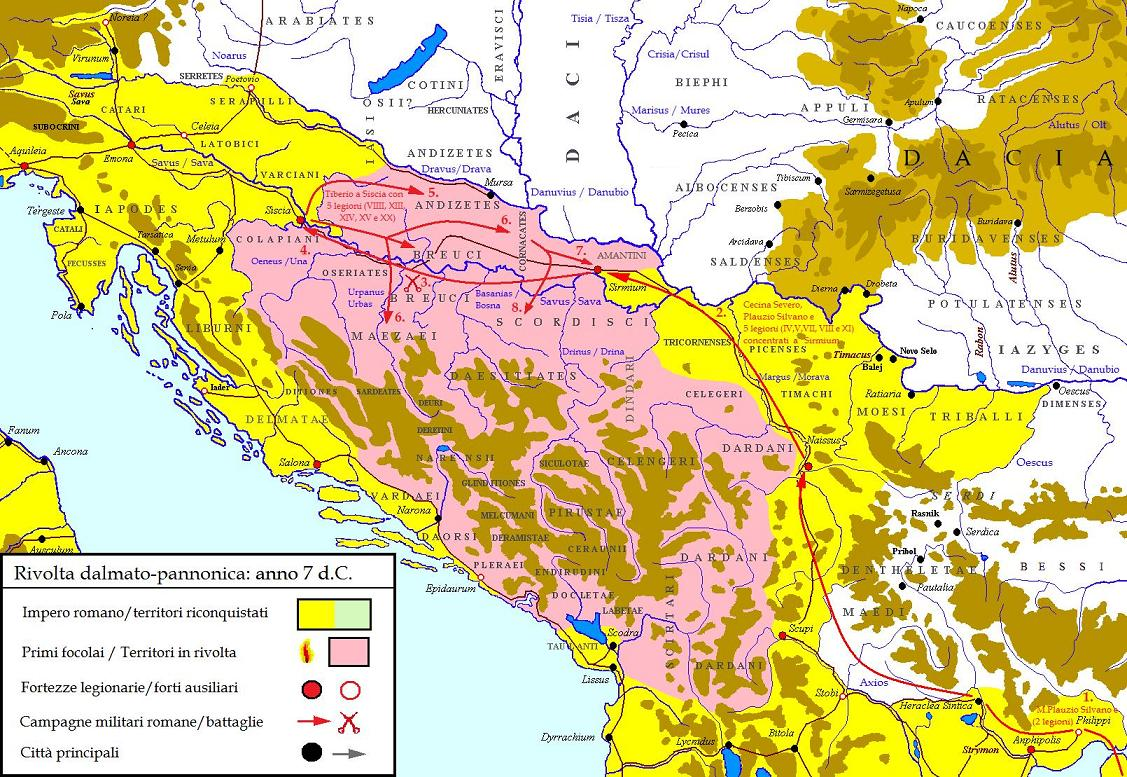 Rivolta dalmato-pannonica 7 A.D.